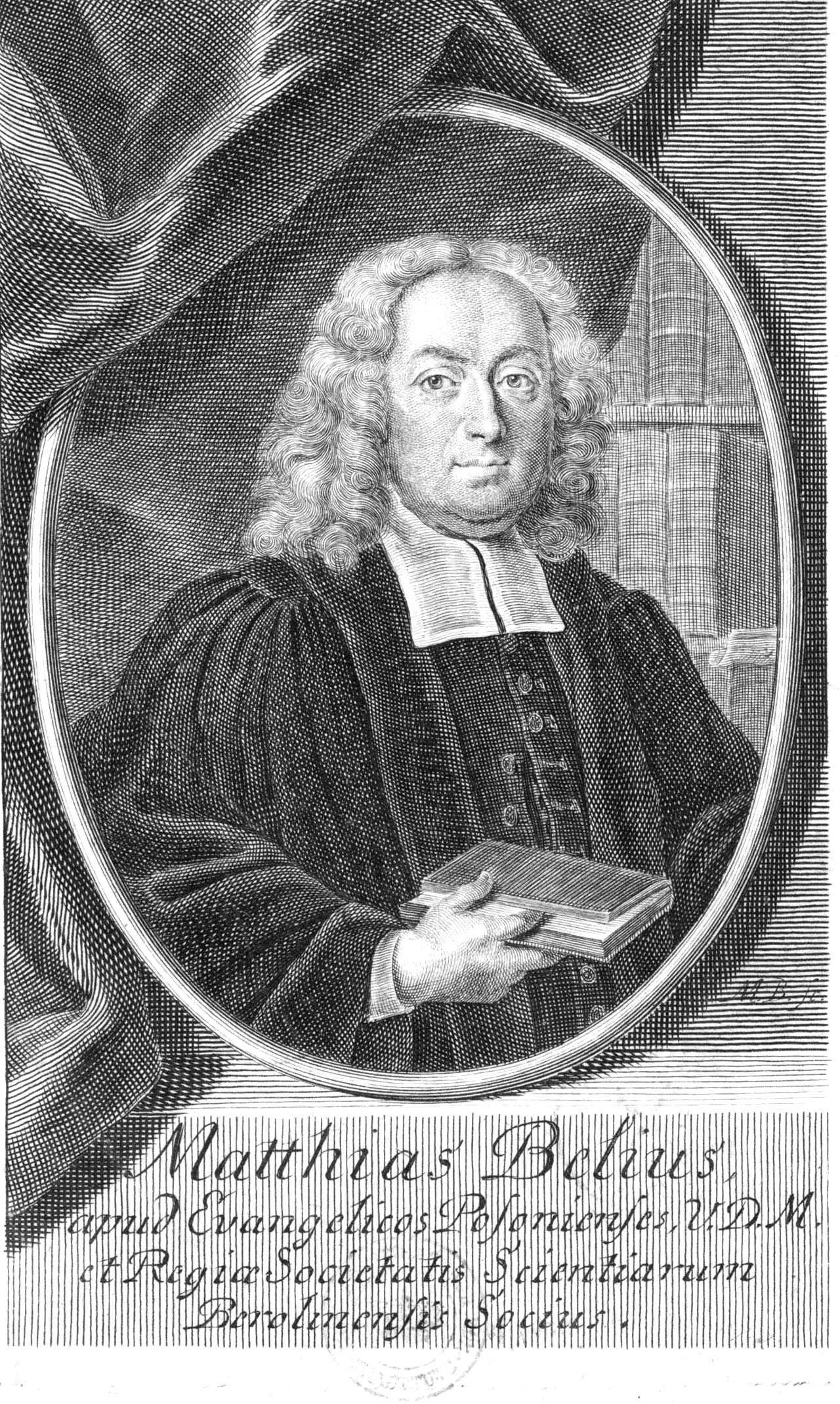 Bél Mátyás (Ocsova, 1684. március 24. – Pozsony, 1749. augusztus 29.) magyar író, evangélikus lelkész, történet- és földrajztudós.